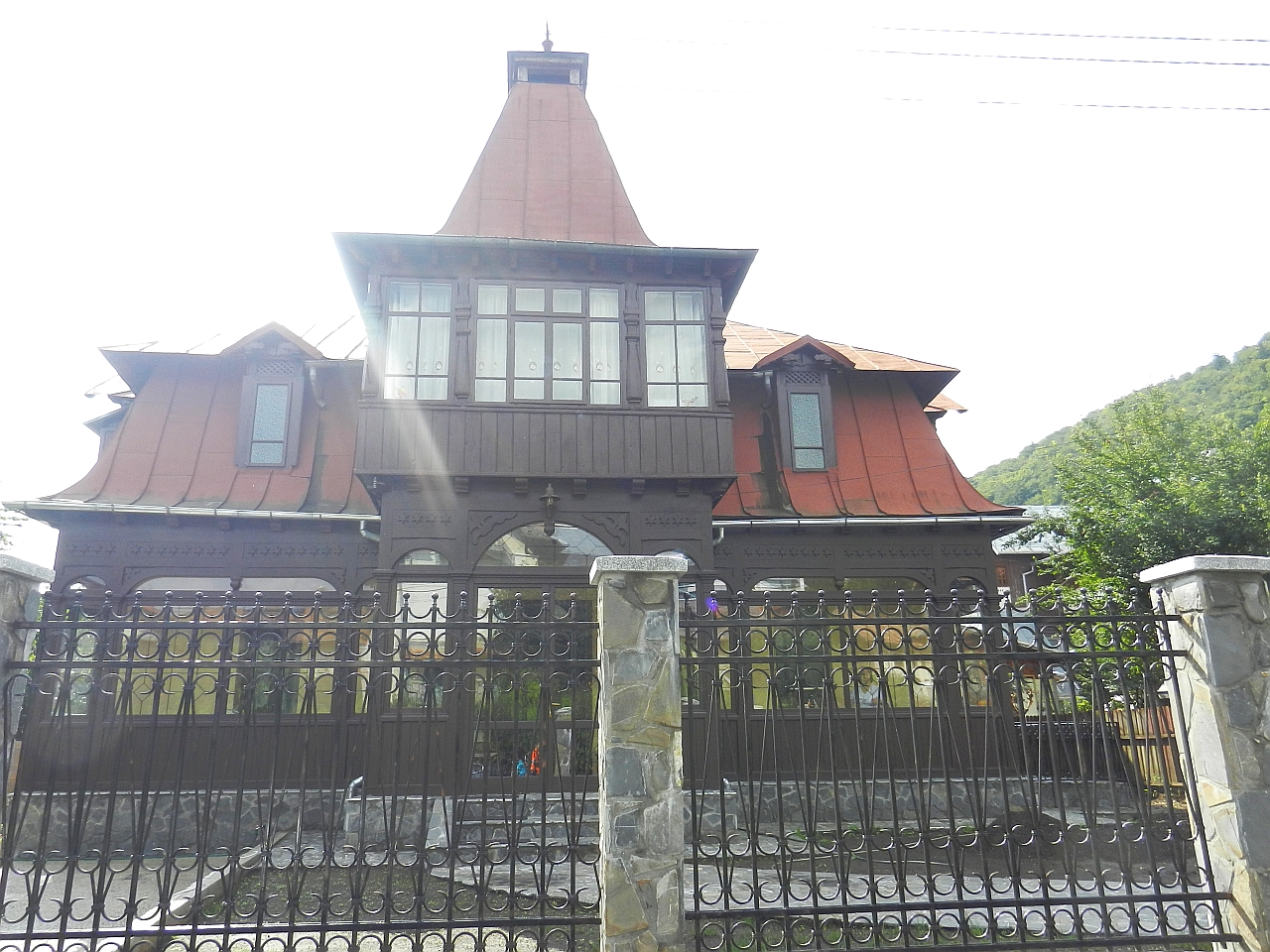 Casa Constantin Dobrogeanu-Gherea